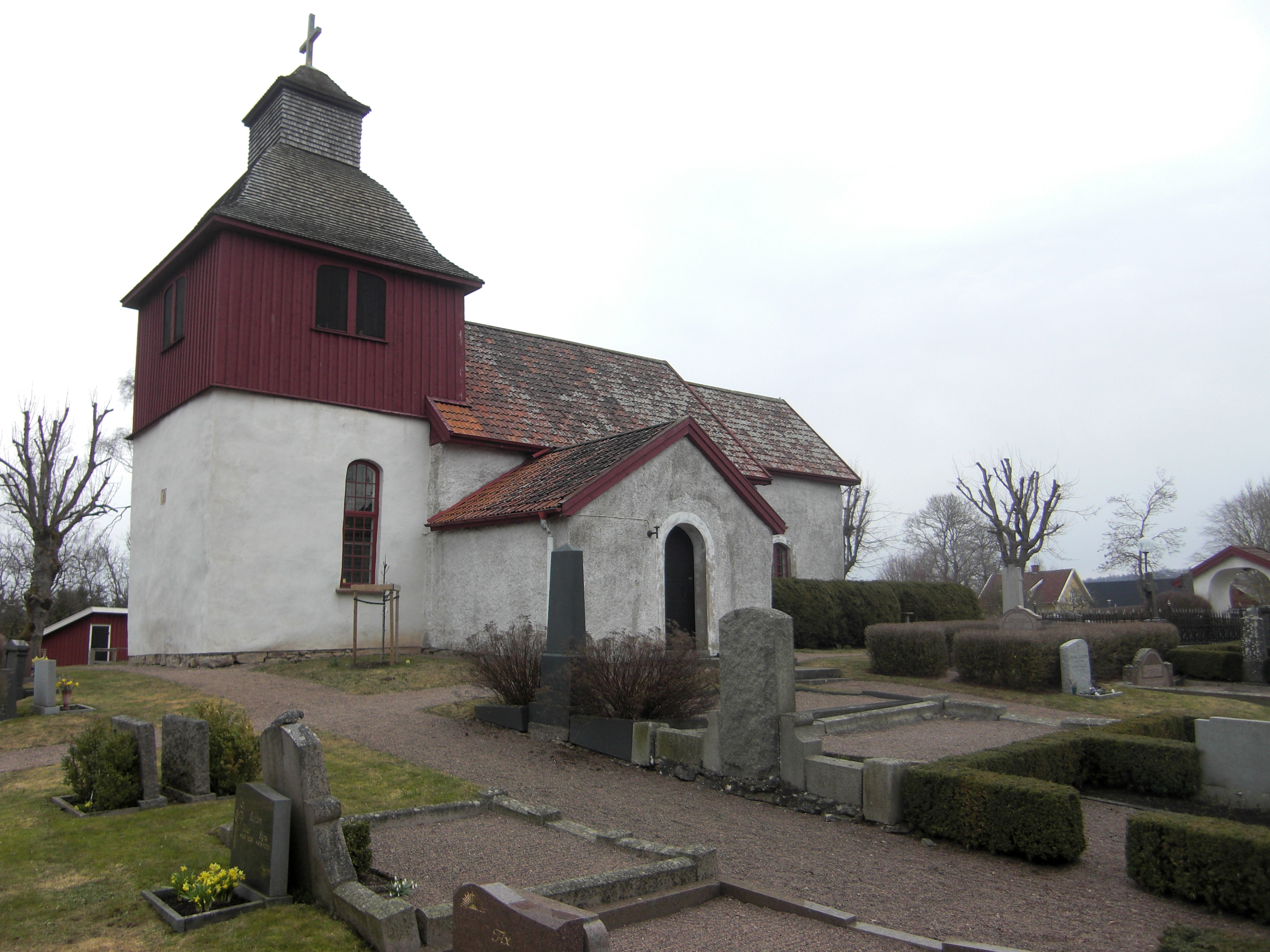 Luttra kyrka i Luttra socken, Ållebergs fjärding i Vartofta härad, Falköpings kommun, f.d. Skaraborgs län, Skara stift, Västergötland, Västra Götalands län, Sverige.